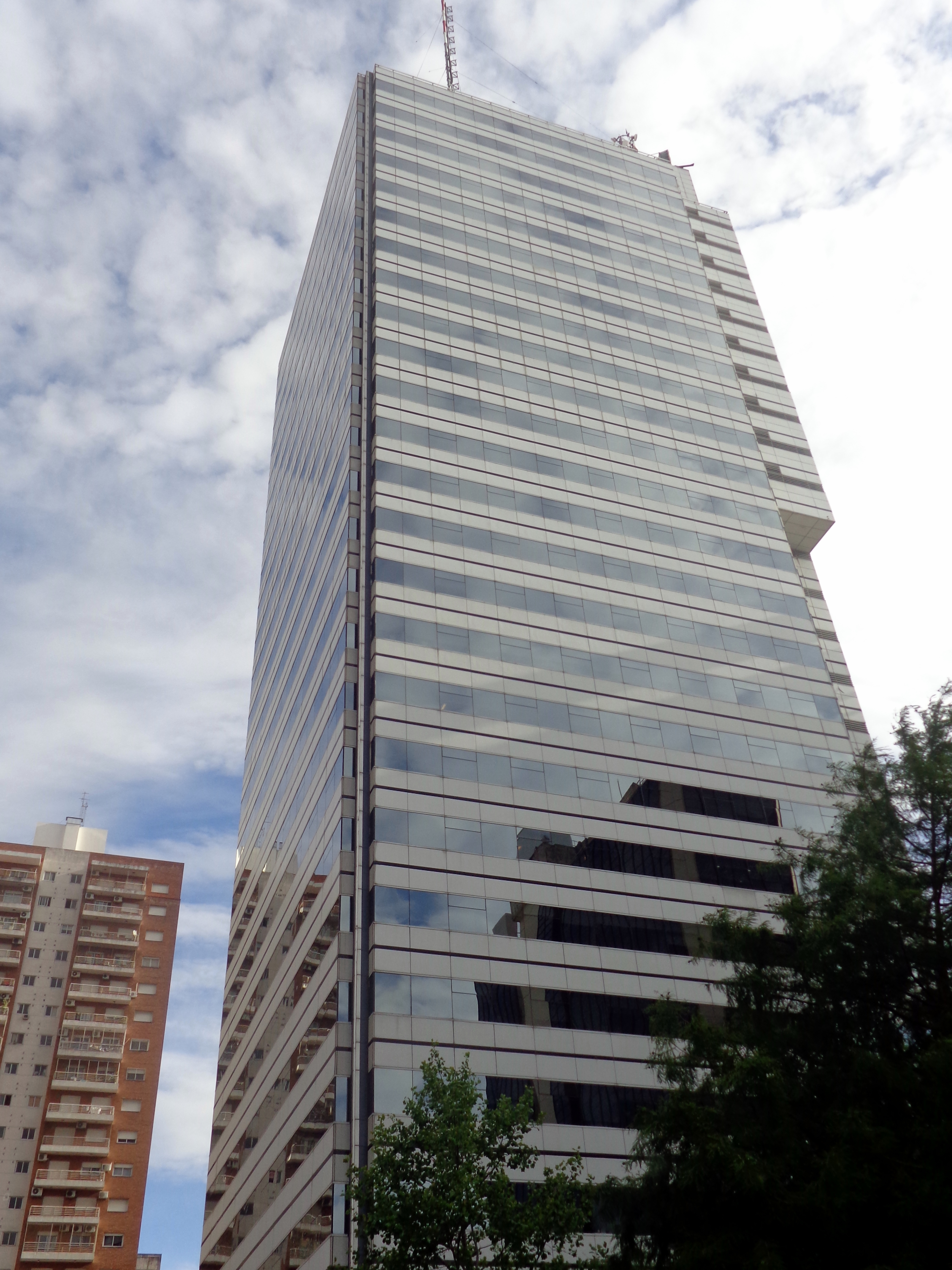 Intercontinental Plaza, ciudad de Buenos Aires. Proyectado por el estudio de arquitectura Mario Roberto Álvarez y Asociados (1994-96).